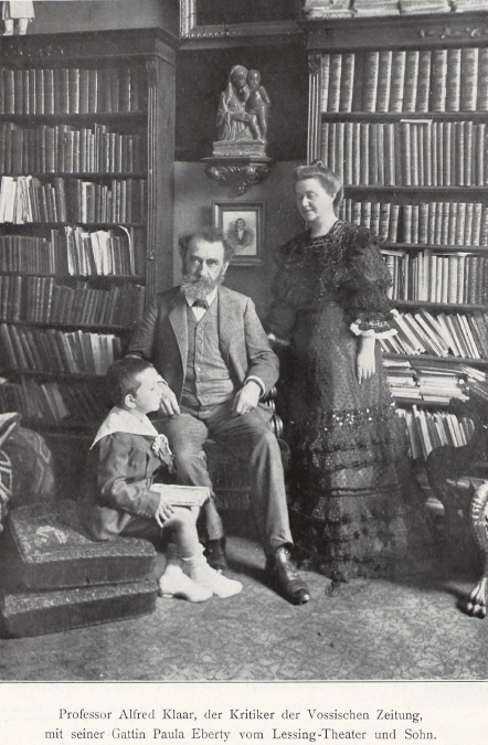 Alfred Klaar (1848-1927), Literaturhistoriker, Journalist und Schriftsteller.